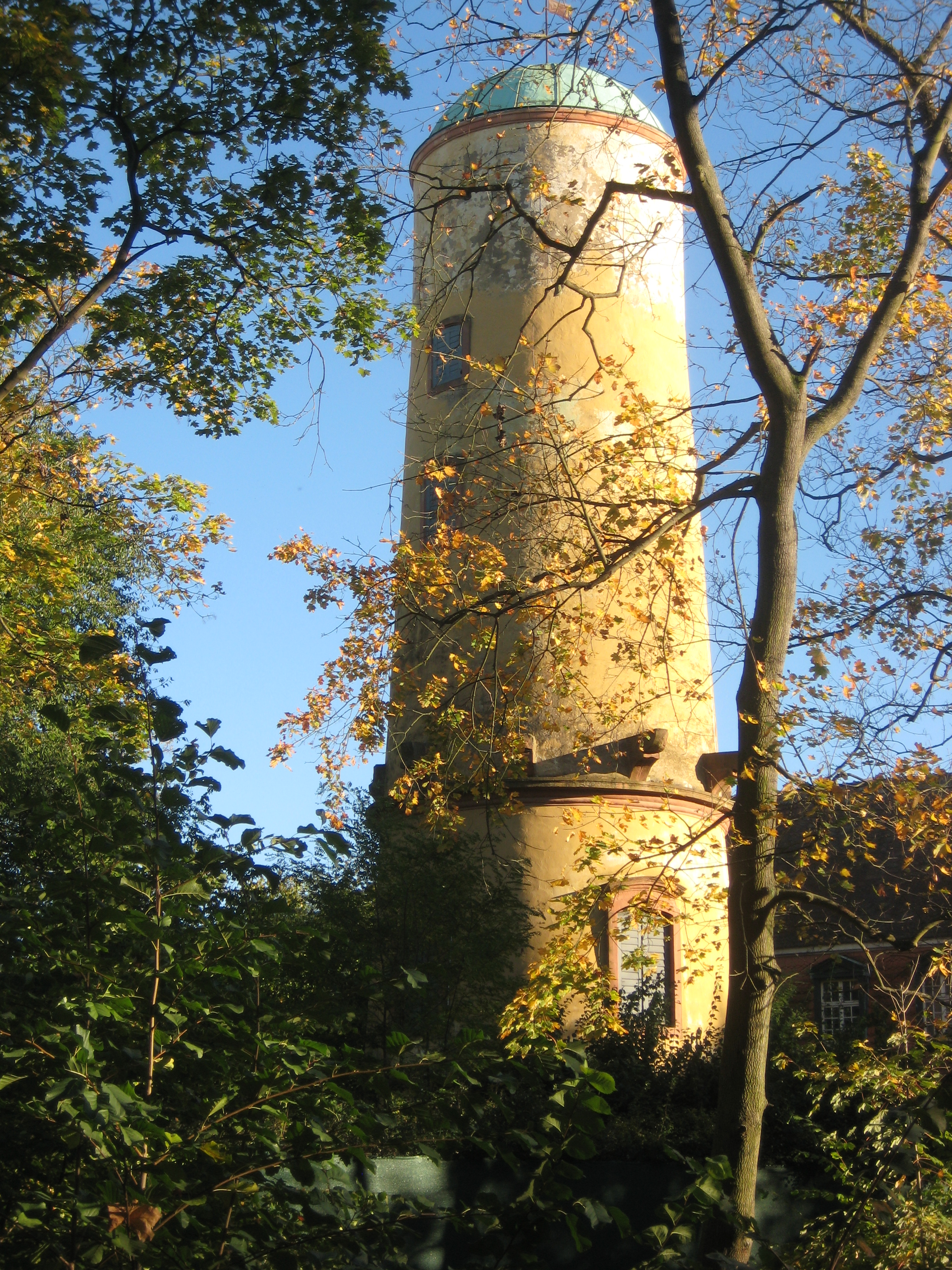 Der Waitzsche Turm